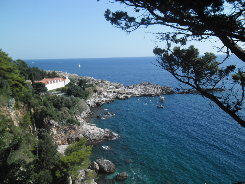 dubrovačko kupalište Danče